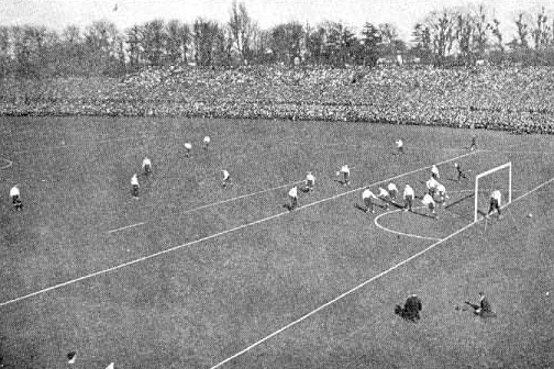 F.A.-Cup-Finale 1901 Tottenham Hotspur - Sheffield United (1:1) am alten Crystal Palace vor 114.815 Zuschauern.